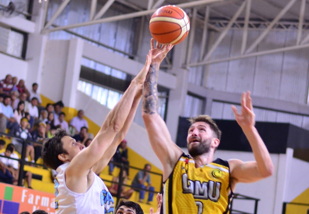 Jugador de básquet en Club Comunicaciones de Mercedes